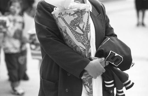 Erster Schultag